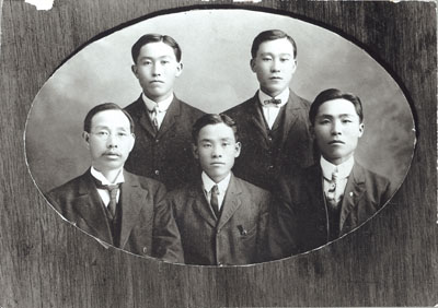 공립협회 회원들(앞줄 맨 오른쪽이 안창호)